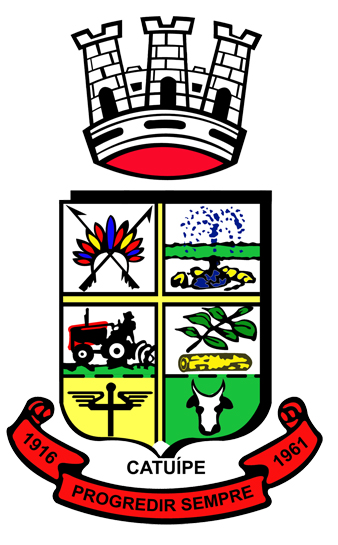 O brasão do município de Catuípe foi instituído como símbolo oficial em pela Lei nº. 048 de 17 de dezembro de 1963, pelo então Prefeito Municipal Elcy Coimbra de Souza. Sendo constituído de um escudo Português, dividido em quatro campos, dois quartéis e um listral. Com as seguintes características: No primeiro campo, em fundo prata, um cocar indígena, com duas flechas, com as pontas cruzadas; No segundo campo, uma fonte borbulhando emanada de um lençol de água subterrâneo; No terceiro campo, um trator roteando a terra; No quarto campo, um ramo de erva mate e uma torra de madeira; No primeiro quartel, o símbolo do comercio em fundo de ouro; No segundo quartel, uma cabeça de bovino em fundo verde; Um listral em cruz separa os campos e quartéis; Como apoio de base uma faixa estilizada, em vermelho, com as datas da elevação de Catuípe à Vila do município de Santo Ângelo e a data de sua emancipação política e o lema “Progredir Sempre”, em negrito, tendo encima da mesma o nome deste município; Na parte superior uma coroa de mural em prata, com três castelos fortes.